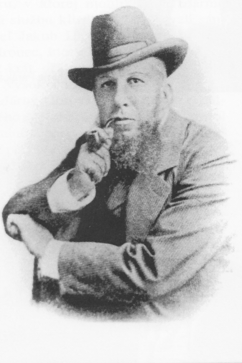 Turista, horolezec, dal podnet na výstavbu chaty - Téryho chaty v Malej Studenej doline vo Vysokých Tatrách